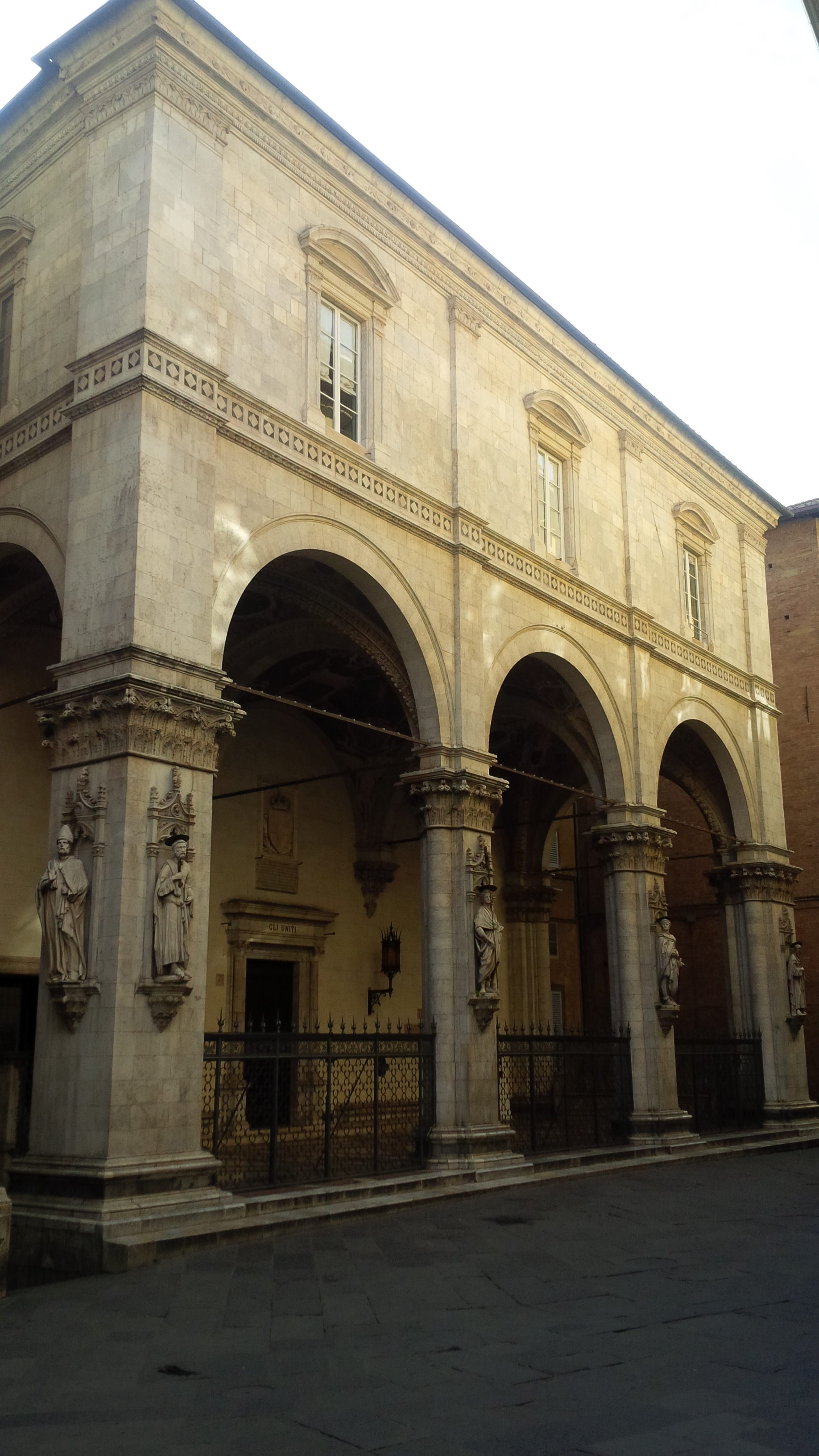 Logge del Tribunale della Mercanzia, oggi del Circolo degli Uniti